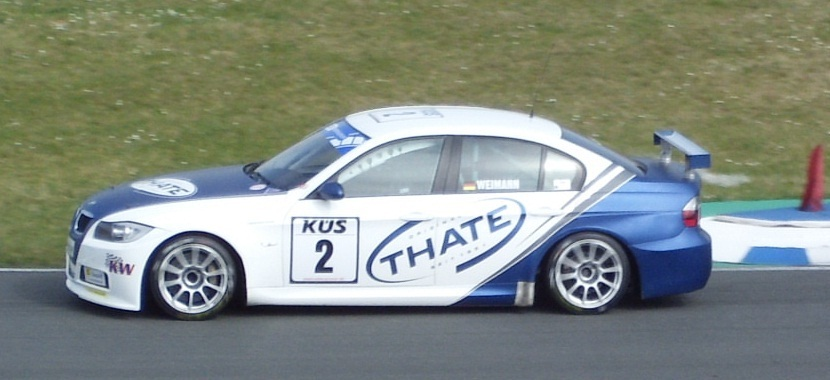 Es ist der BMW 320si des Rennteams "Thate Motorsport" gefahren von Jens-Guido Weimann beim ersten Saisonlauf zur ADAC Procar 2012 in Oschersleben.